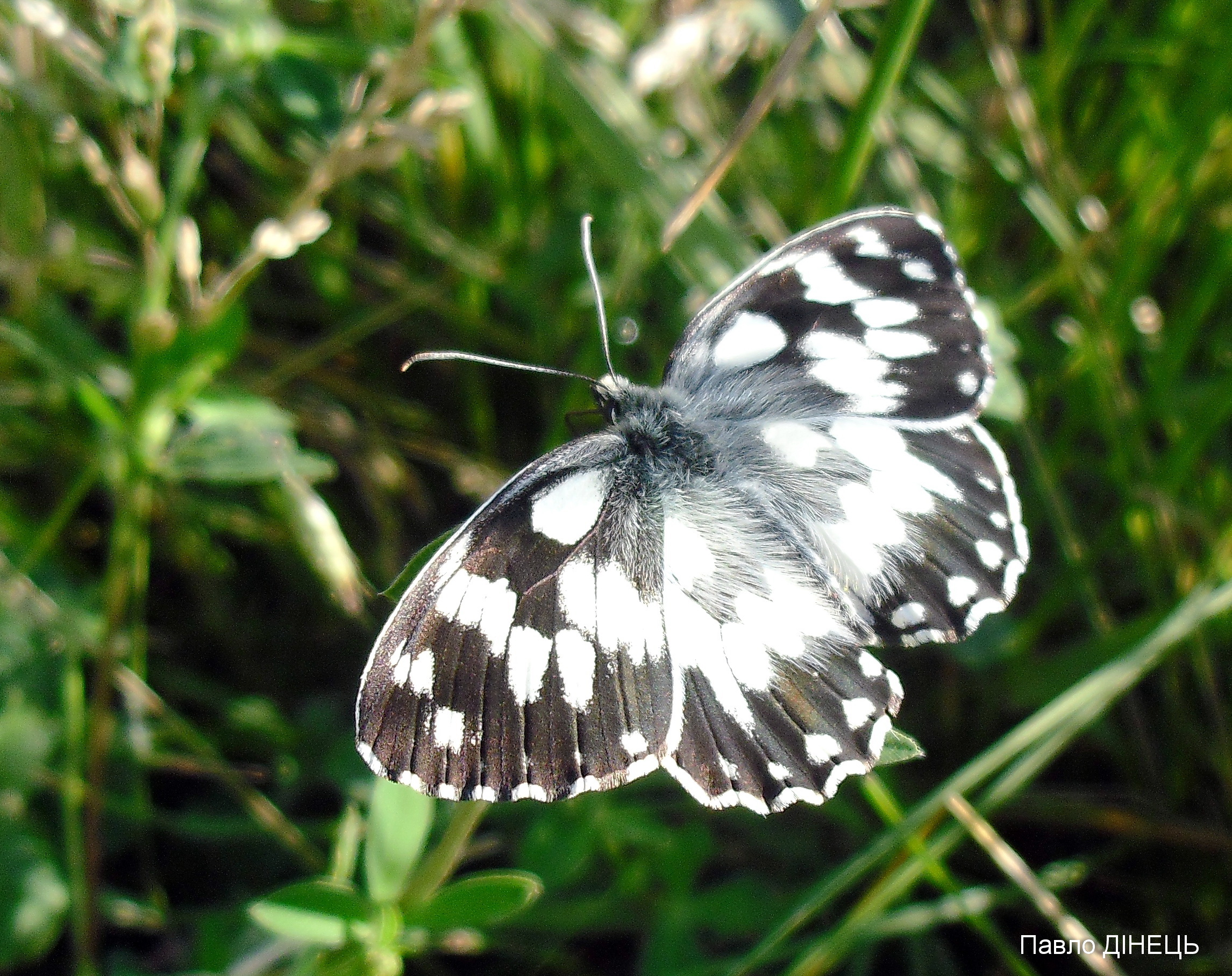 Дніпровсько-Орільський, Дніпропетровський та Петриківський райони, Орільське лісництво